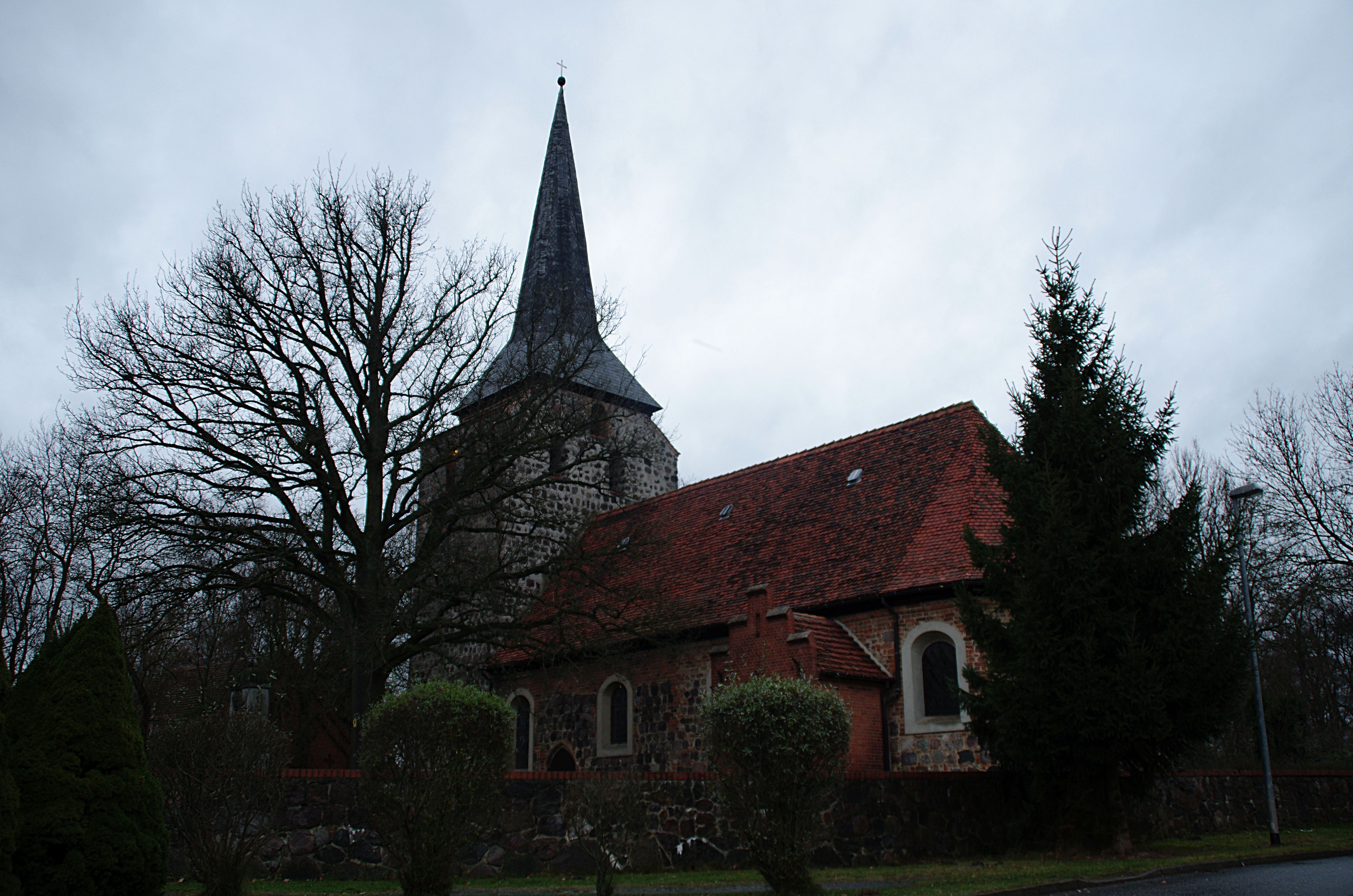 Dorfkirche Manker, Gemeinde Fehrbellin, Landkreis Ostprignitz-Ruppin in Brandenburg. Die Kirche im Ortsteil Manker ist denkmalgeschützt. Object location52° 50′ 45.38″ N, 12° 40′ 40.47″ E